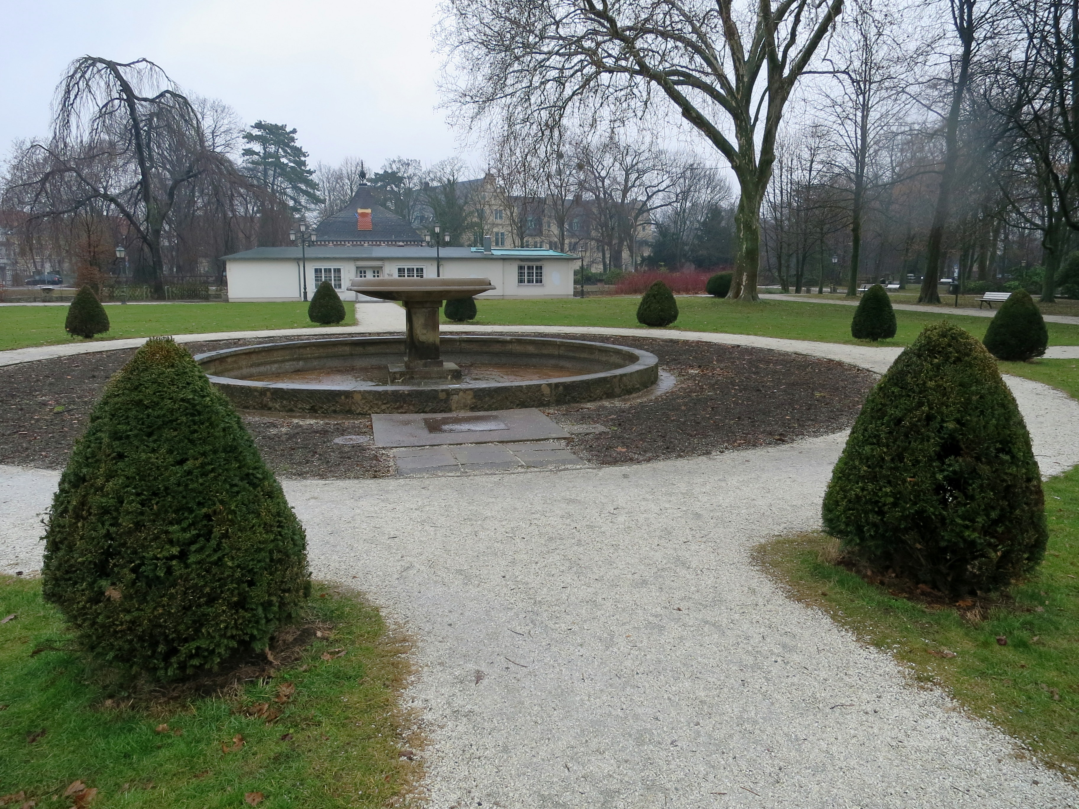 Der Stadtgarten ist im Winter wenig belebt.